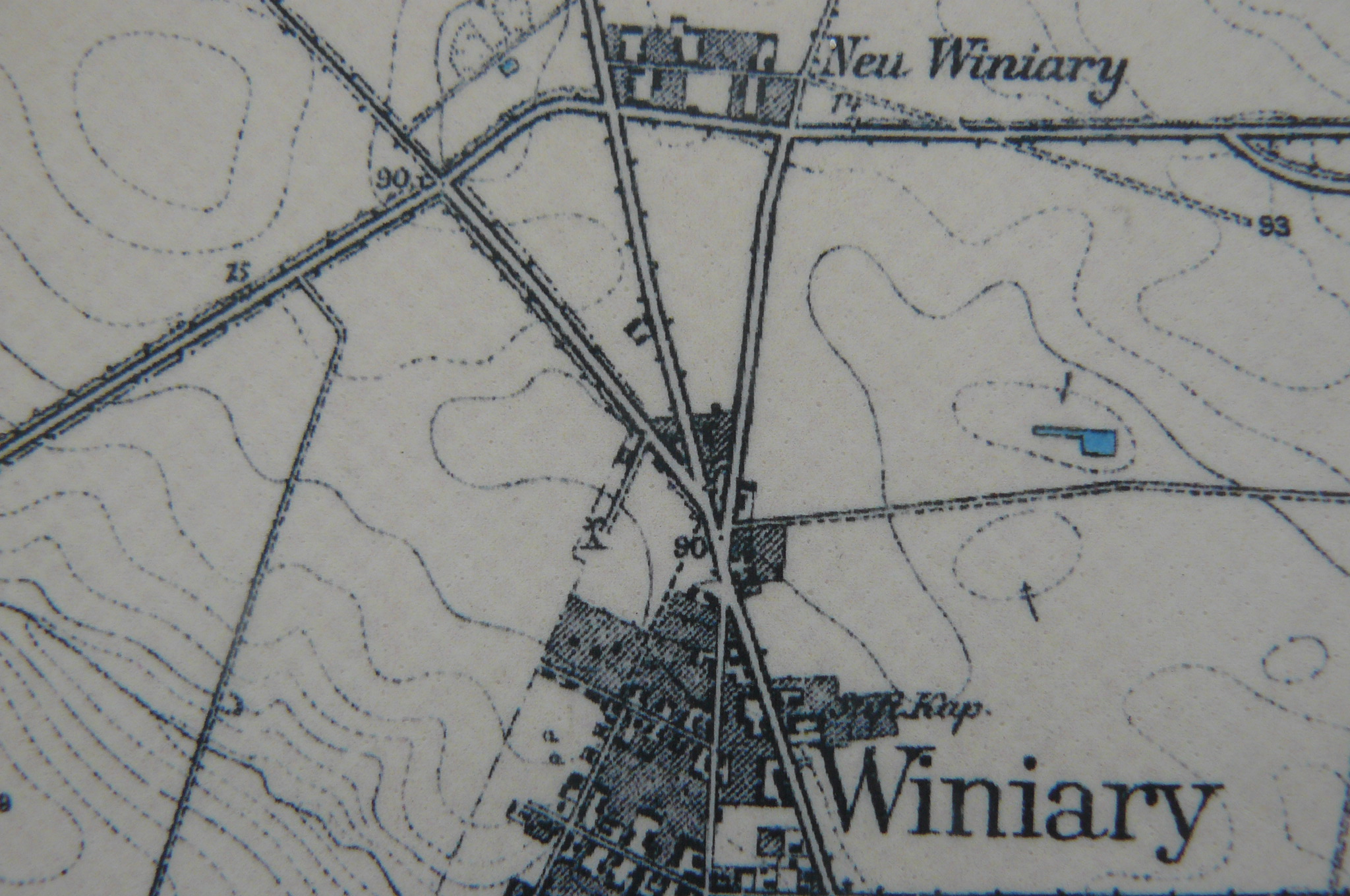 Mapa Winiar (Poznań) z 1895.